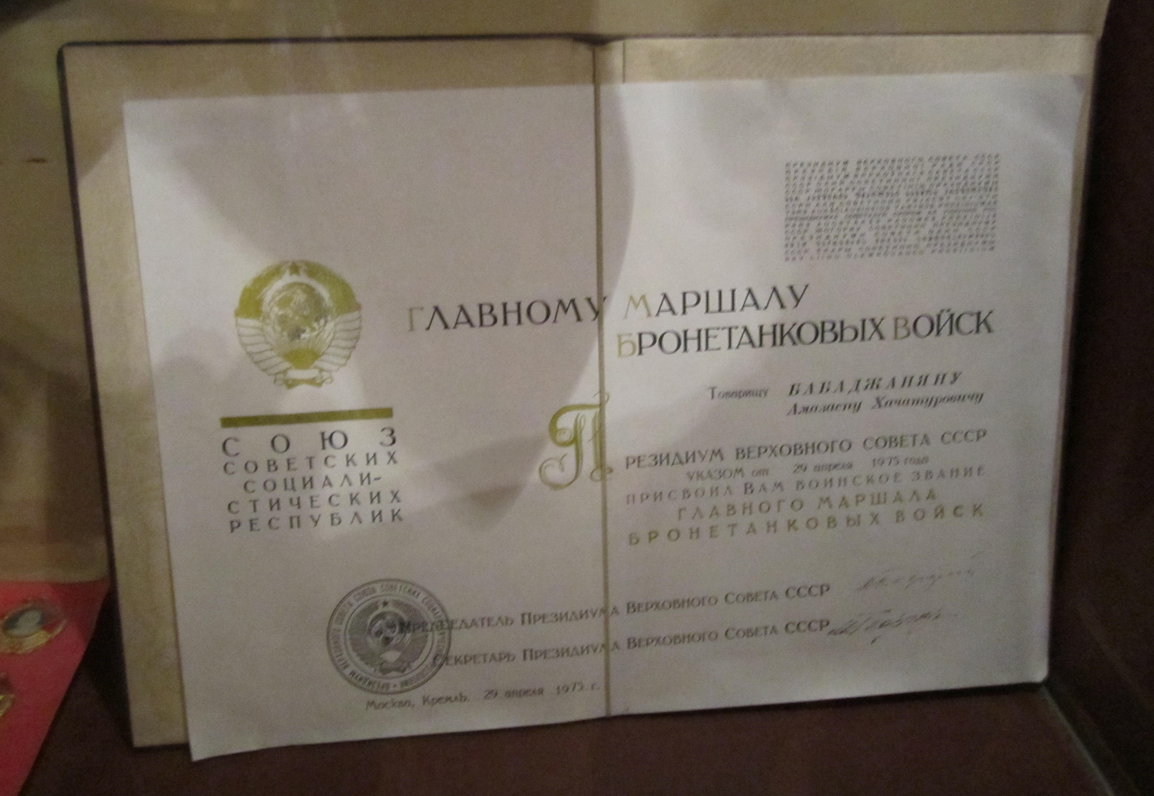 Почётная Грамота Президиума Верховного Совета СССР Главному маршалу бронетанковых войск Бабаджаняну Амазаспу Хачатуровичу